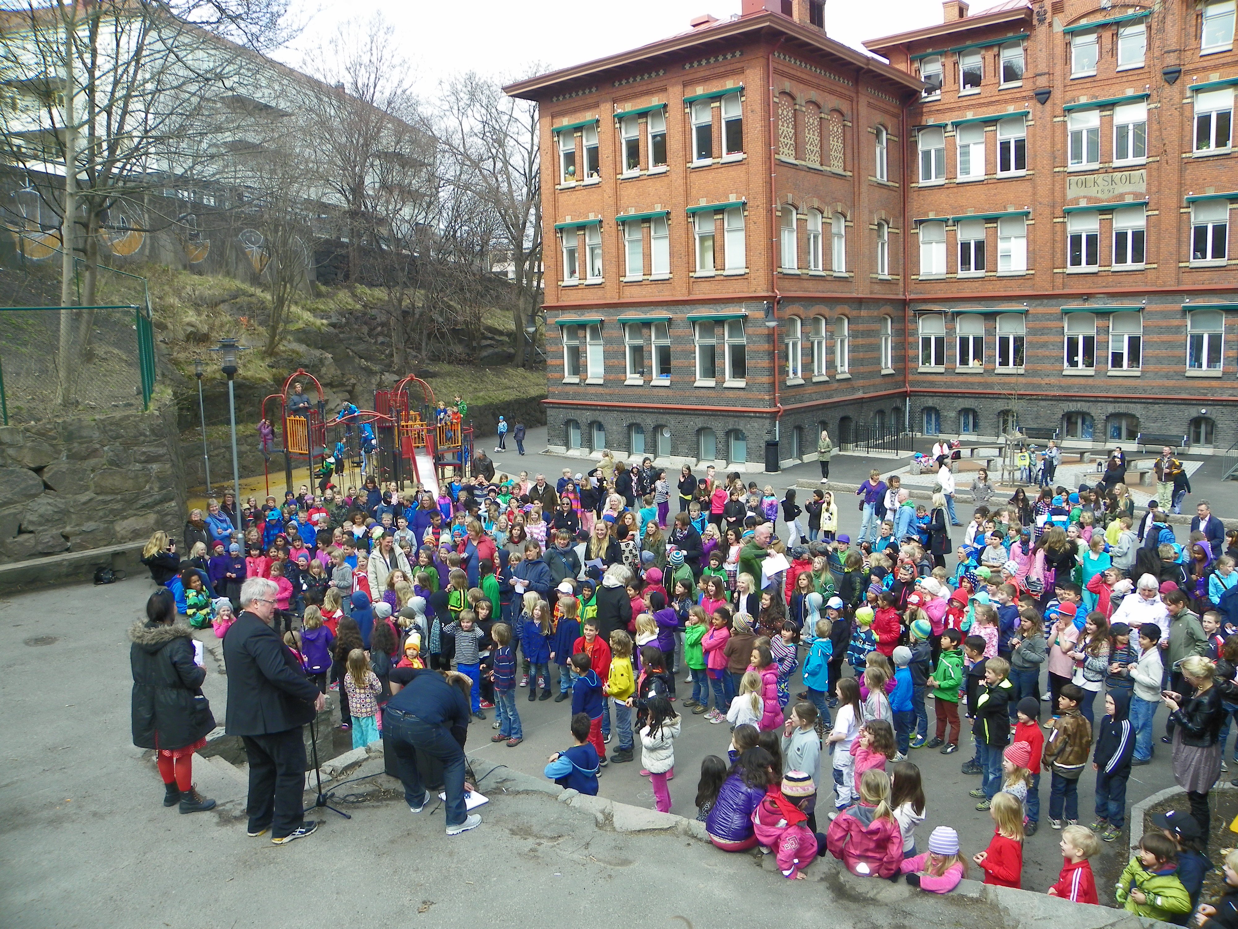 Skolan sjunger in våren 2013